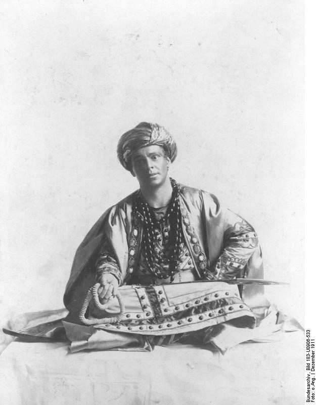 Alexander Moissi ADN-ZB Der Schauspieler Alexander Moissi als Prinz Kalaf in Carlo Gozzis "Turandot", aufgeführt vom Deutschen Theater zu Berlin. (Aufn.: Dezember 1911) Abgebildete Personen: Moissi, Alexander: Schauspieler, Deutschland (GND 118583271)